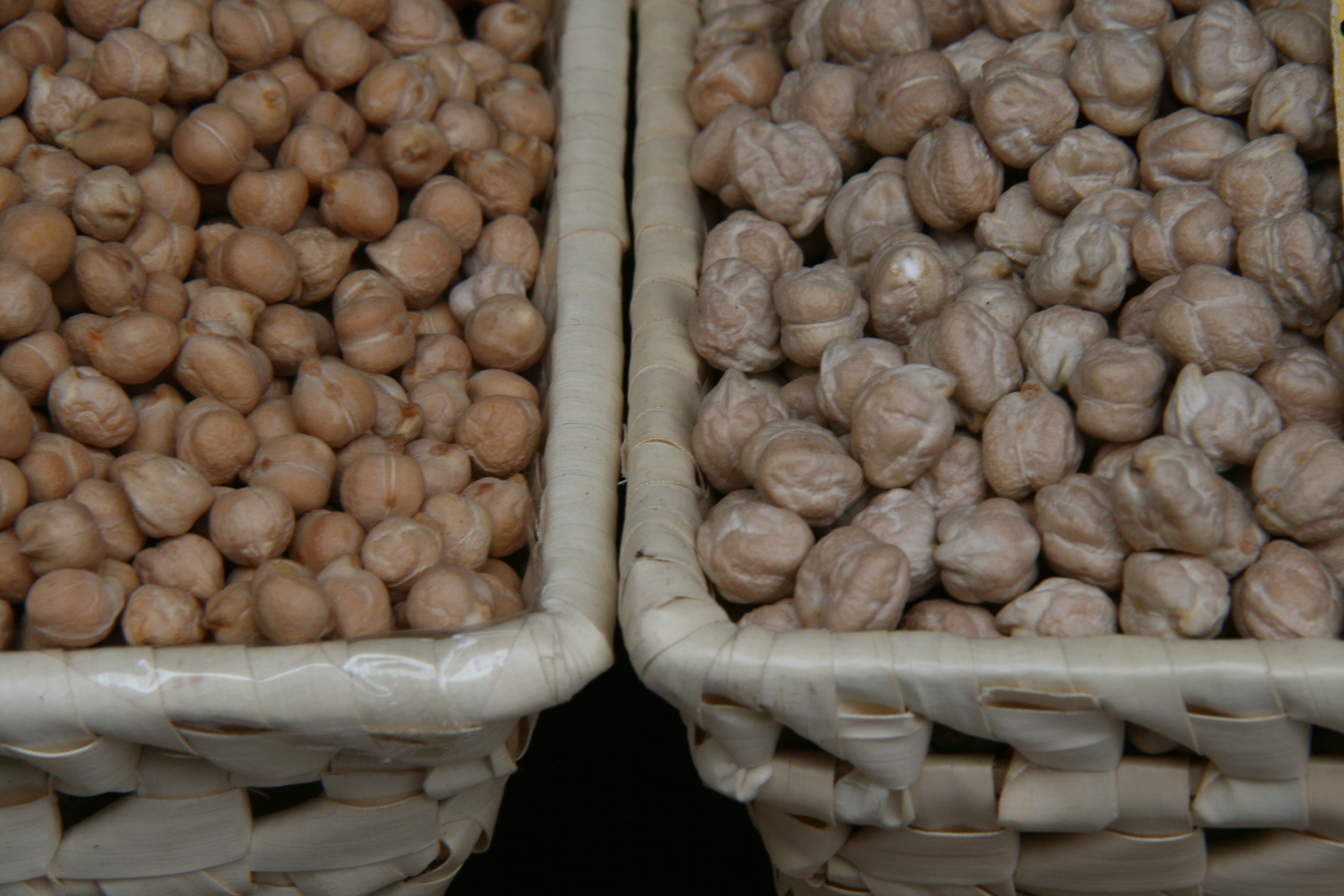 Garbanzos Pedrosillano (Pedrosillo el Ralo) - A la izquierda Garbanzo de Fuentesauco (Zamora) - A la derecha